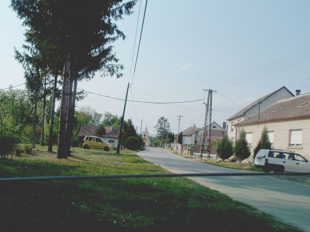 Perenye, Hungary